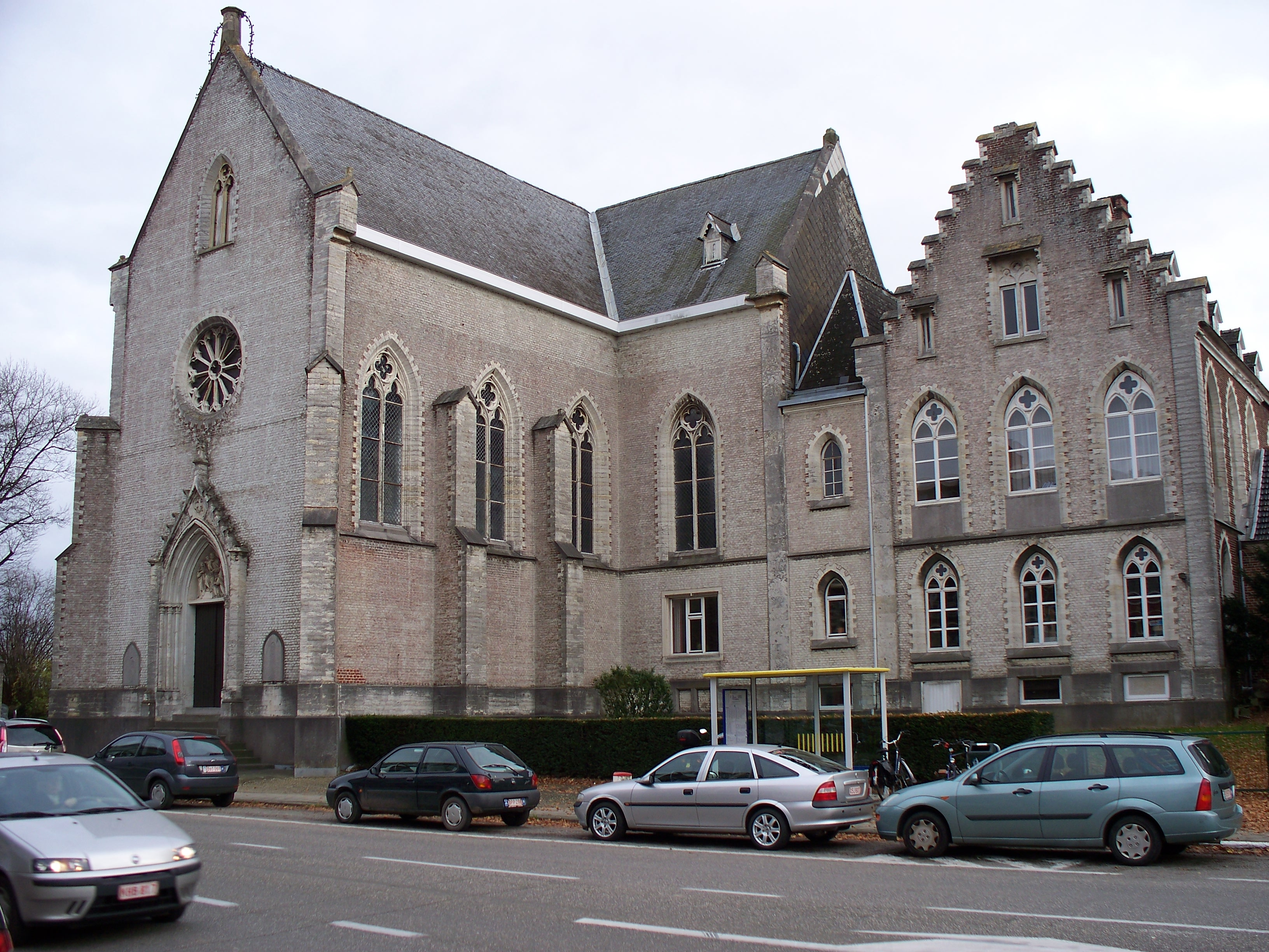 Ter Bank,Leuven